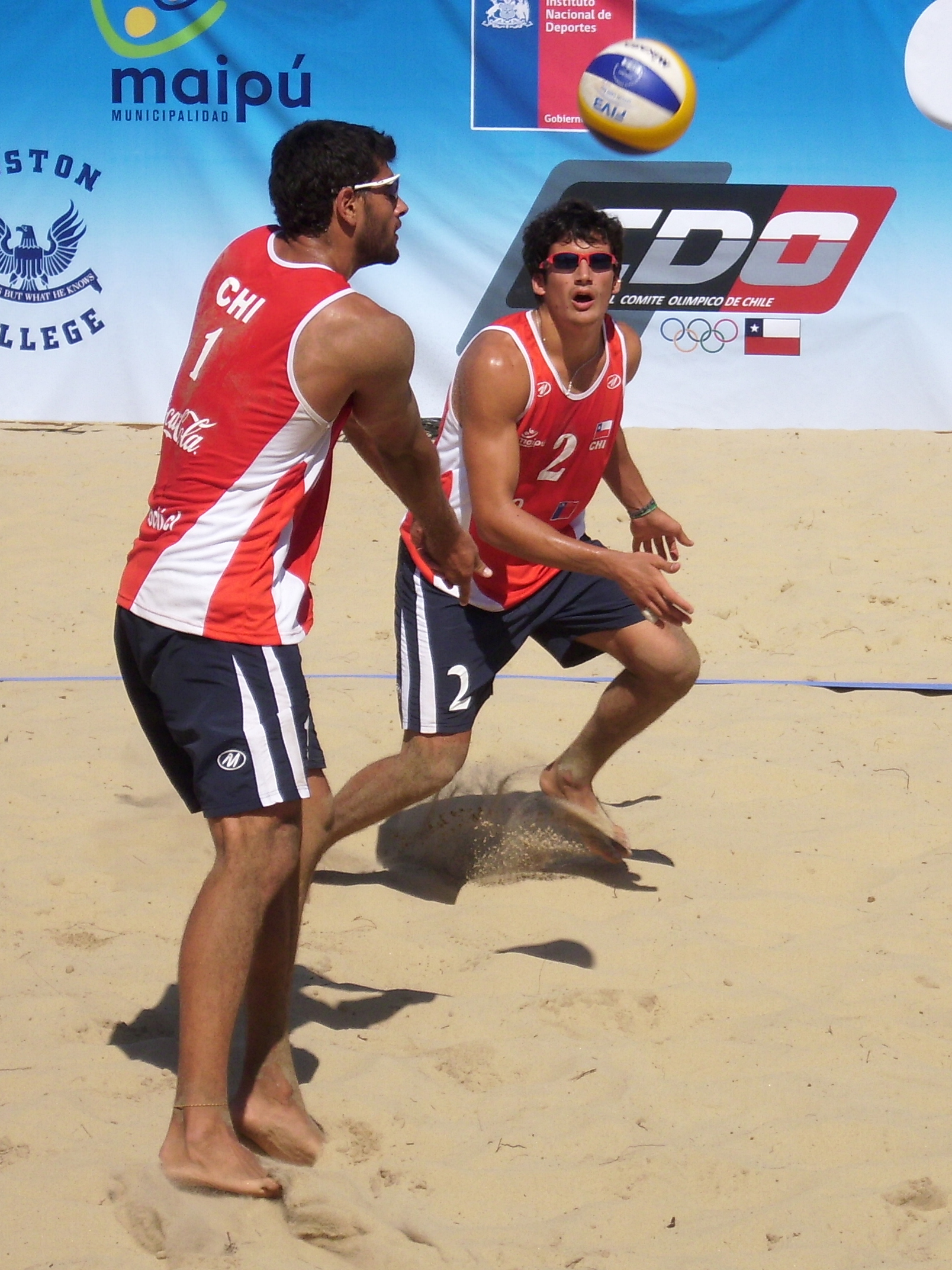 La dupla de voleibolistas chilenos conformada por los primos Marco y Esteban Grimalt durante uno de los partidos contra la selección brasileña en el Continental Cup, torneo de vóleibol playa clasificatorio para los Juegos Olímpicos de Londres 2012 que se realizó en la Plaza de Armas de Maipú (Santiago de Chile) entre el 24 y el 27 de noviembre de 2011.